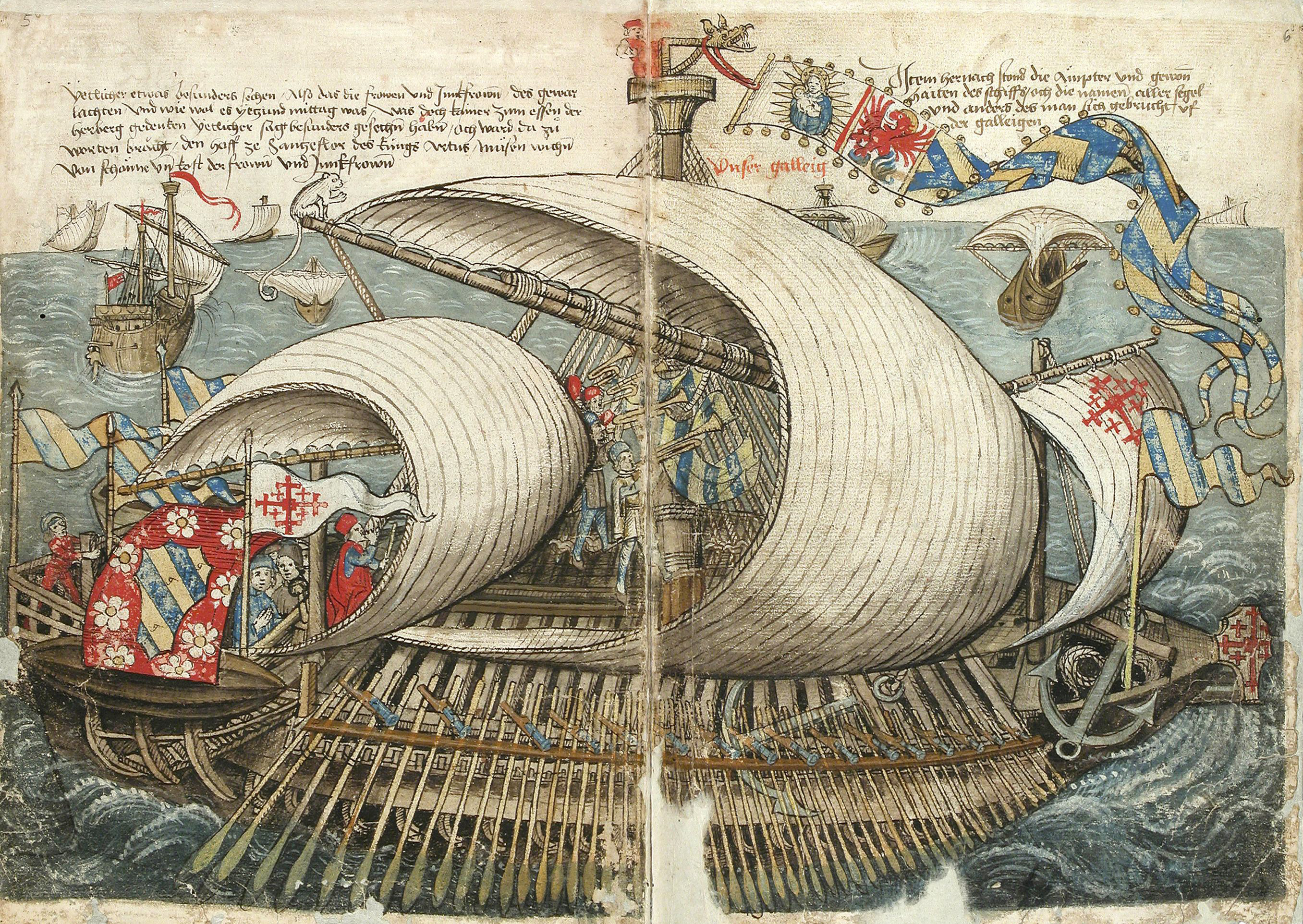 Doppelseite, aus Conrad Grünenberg: Beschreibung der Reise von Konstanz nach Jerusalem. Bodenseegebiet, um 1487. Badische Landesbibliothek Karlsruhe, Cod. St. Peter, pap. 32.